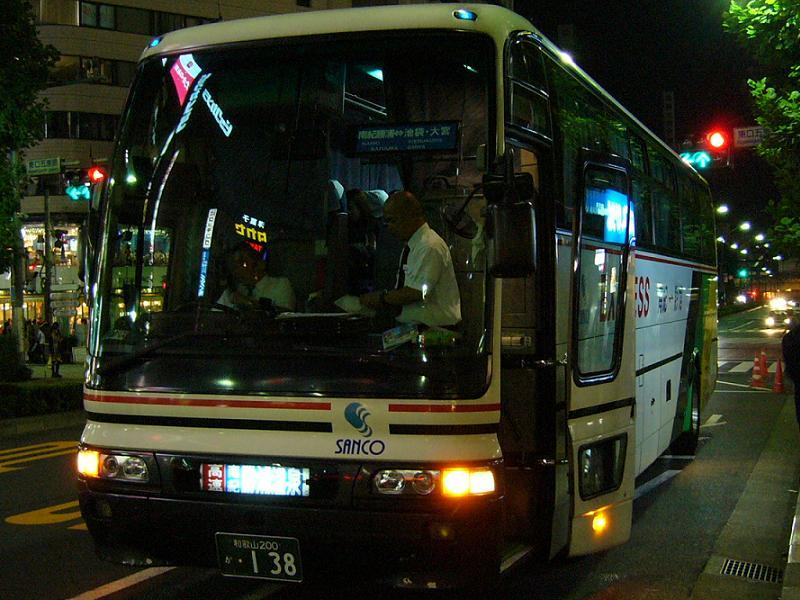 登録番号 和歌山200か・138 三重交通所属 大宮～南紀線用 2005年10月1日 池袋駅東口にて撮影